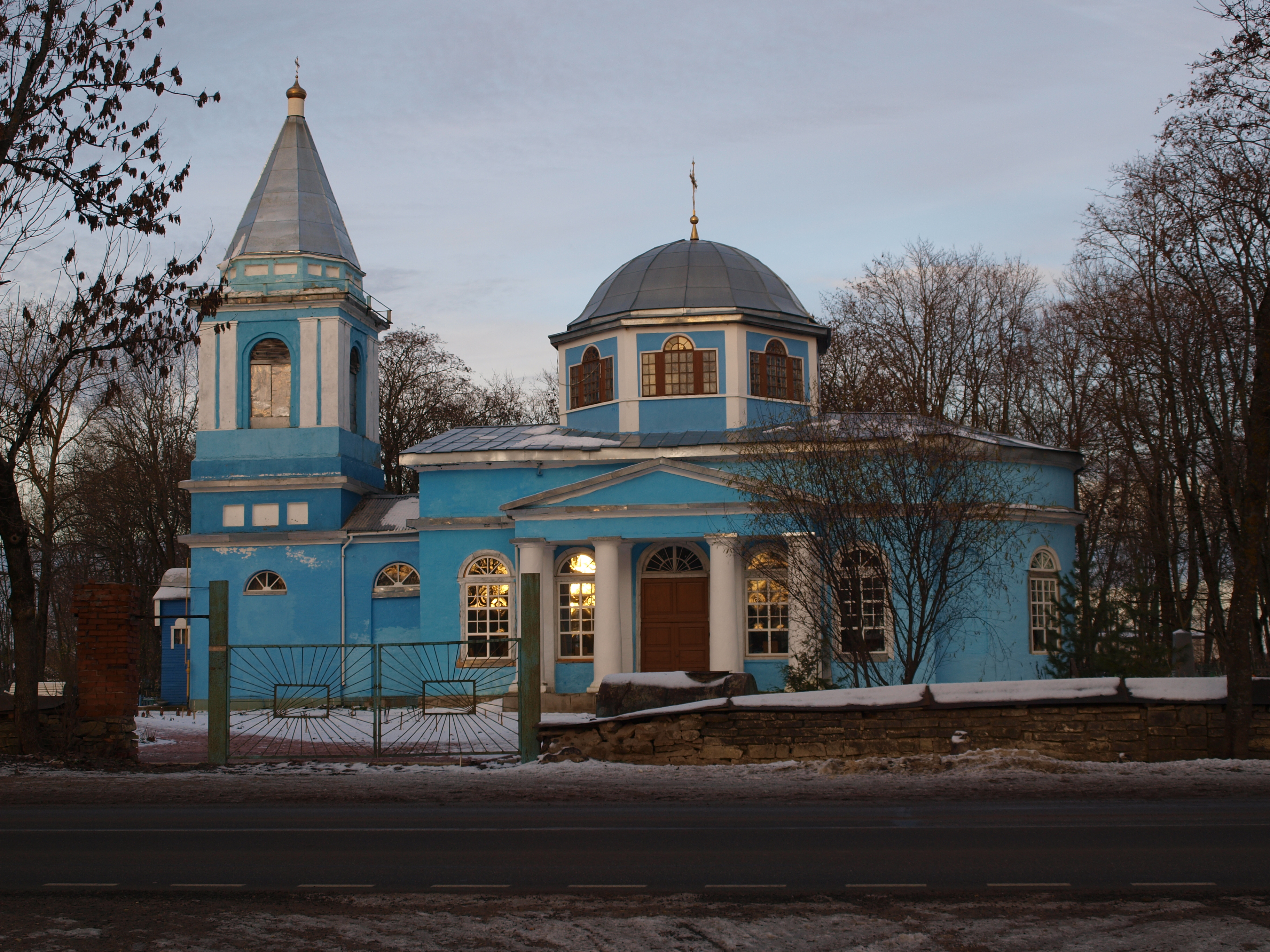 Церковь Успения Пресвятой Богородицы с колокольней: Большая Вруда, Волосовский район, Ленинградская область